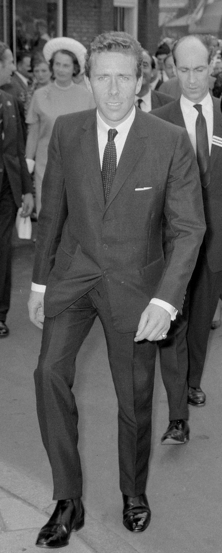 Prinses Margaret en Lord Snowdon winkelen in Leidsestraat, tijdens het winkelen